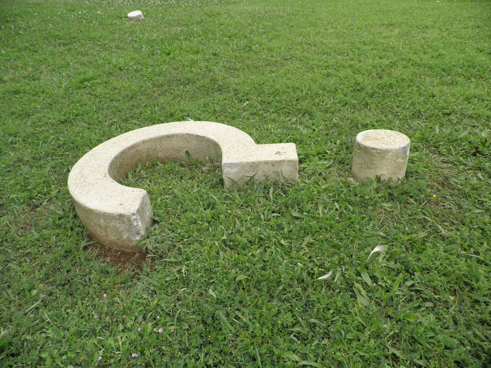 Poema visual transitable en tres temps (Joan Brossa). Segon temps: camí -amb pauses i entonacions-. Jardins de Marià Cañardo, Velòdrom d'Horta (Barcelona).